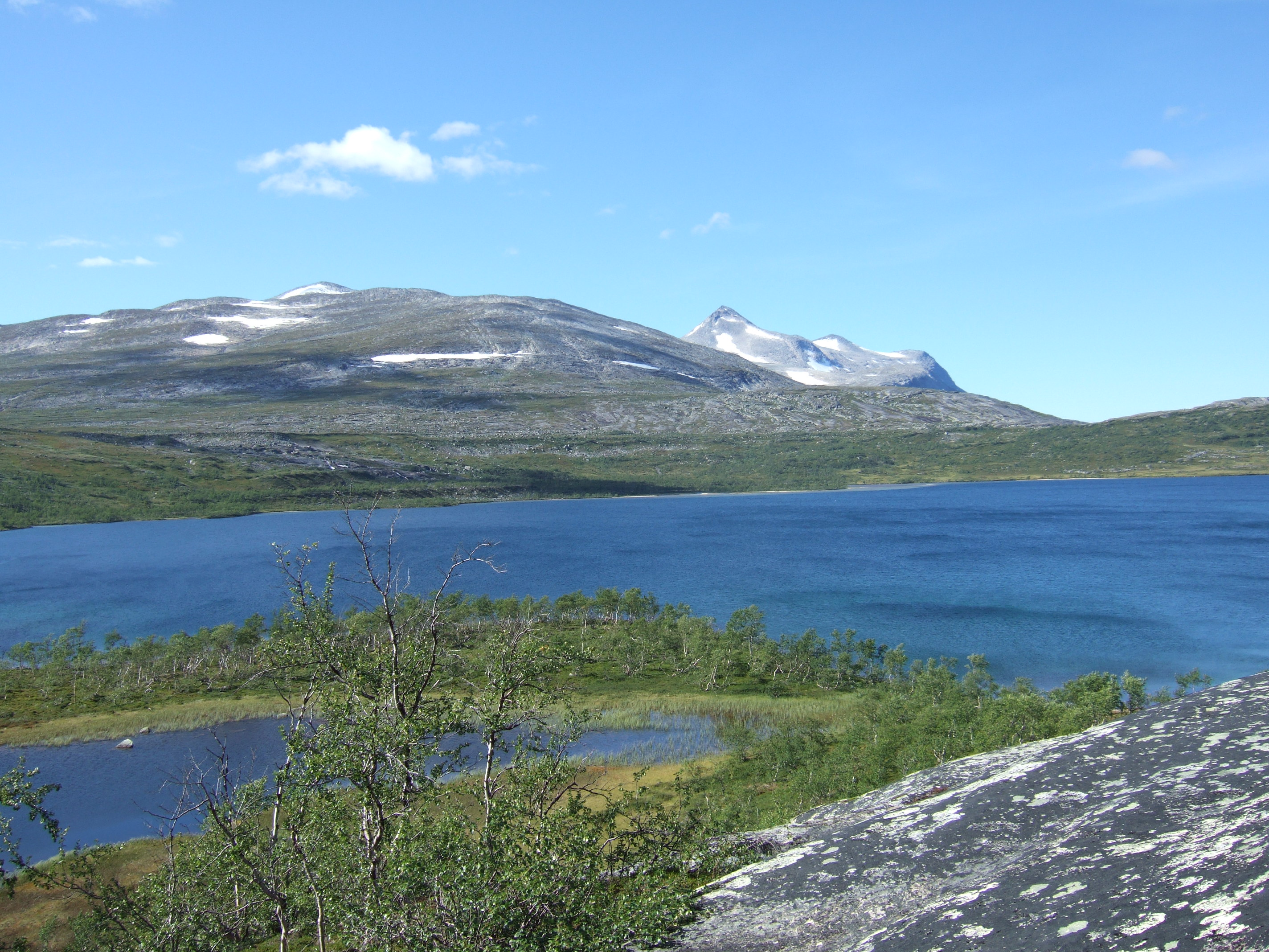 Kjemåvatnet på Saltfjellet i Saltdal kommune, Nordland.